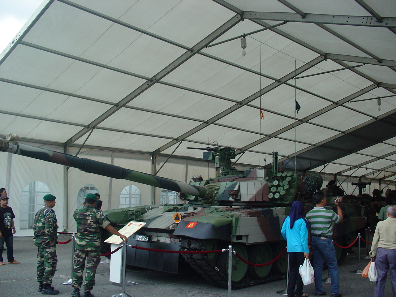 Czołg podstawowy PT-91M. Zdjęcie zrobione podczas KL International Tattoo Show 2007